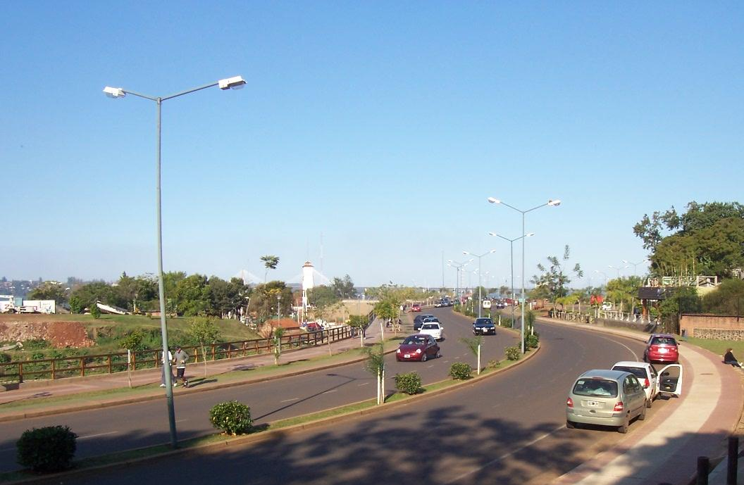 Avenida Costanera de la ciudad de Posadas, Misiones, Argentina.